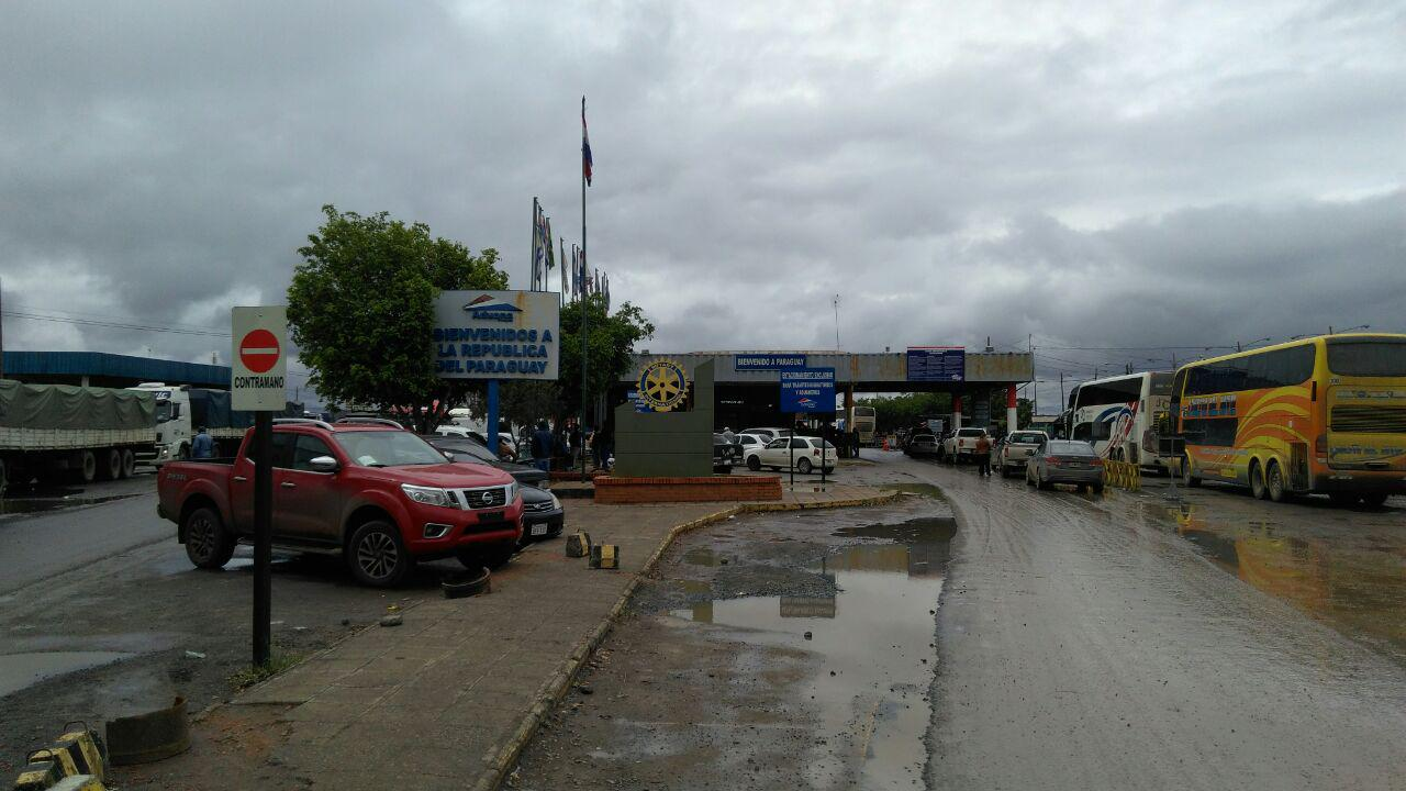 Vista de los edificios del paso fronterizo de Puerto Falcón desde el puente sobre el río Pilcomayo